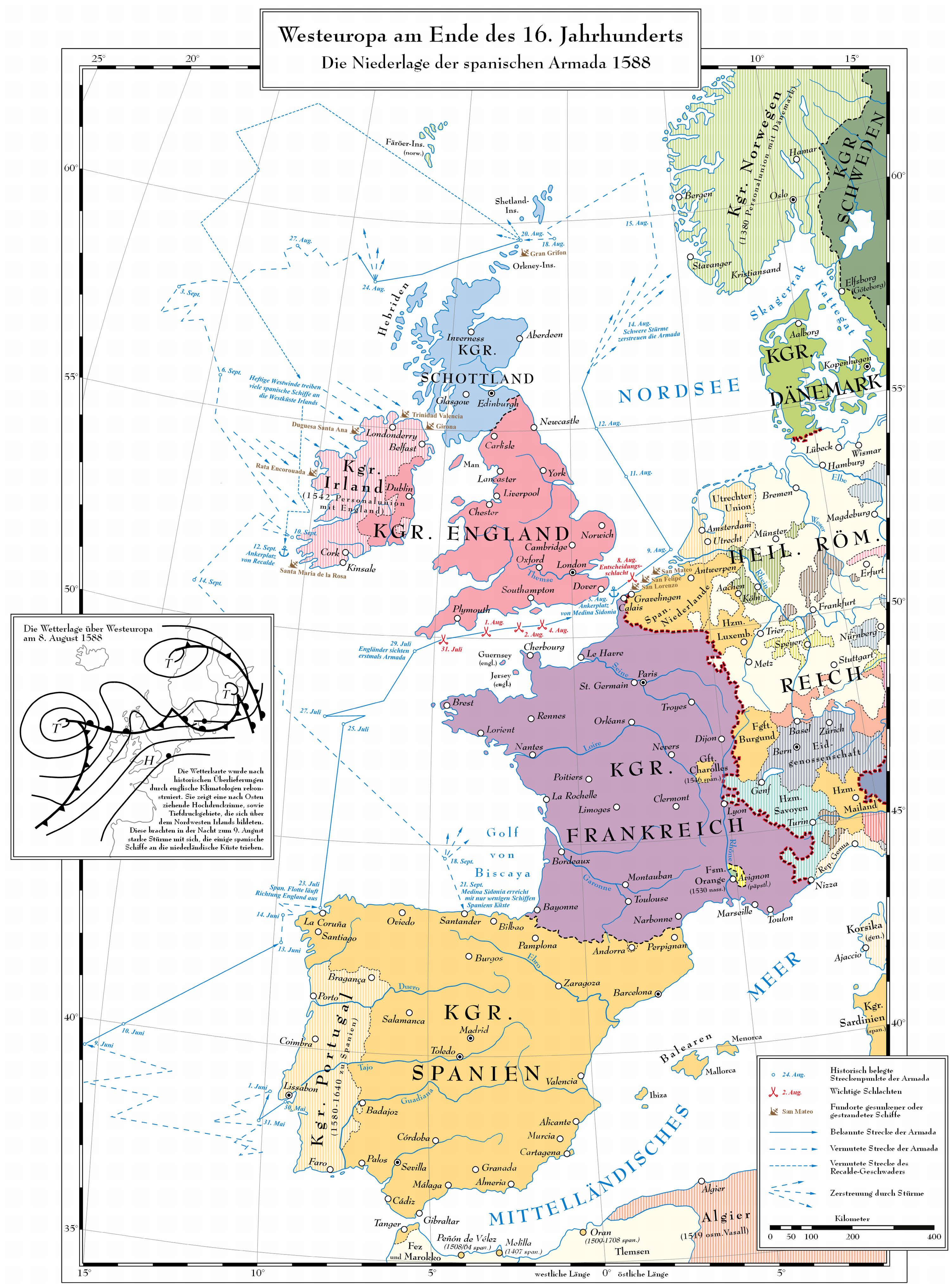 Westeuropa am Ende des 16. Jahrhundert - Die Niederlage der Spanischen Armada 1588 V2.0 Originalkarte (V1.0) entstand unter enormer Mithilfe meiner Frau im Rahmen einer Studienarbeit Genutztes Programm: Freehand MX Vorlage Hintergrund: Putzger 2002, Atlas und Chronik zur Weltgeschichte, diverse Geschichtsatlanten Routenvorlage aus: Padfield, Peter: Armada, Westermann, Braunschweig 1988, eigene Ergänzungen anhand des Buches Versionslog: V2.0 Wetterkarte, Maßstabsleiste eingefügt Überschrift und Legende besser eingebunden Rahmen verändert Wenige inhaltliche Korrekturen und Ergänzungen Neue Lizenz